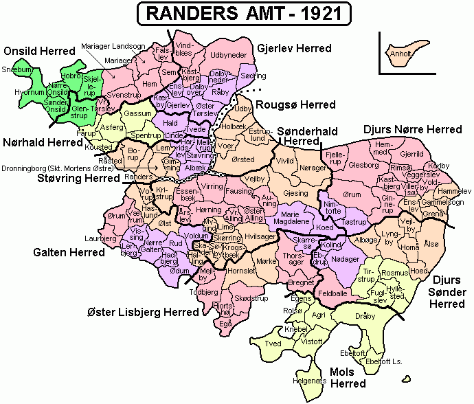 Det gamle Randers Amt (1793-1970). Kortet er udarbejdet af Svend-Erik Christiansen. Farvelagt af Twid - med grøn er markeret et område, der gik til Nordjyllands Amt, og de andre farver markerer kommuner, der kom til at ligge i Aarhus Amt. Kopieret fra den danske Wikipedia. Map of Randers County, Denmark (1793-1970). Map by Svend-Erik Christiansen. Colours by Twid. The green nuances show parts of the province that became part of North Jutland County in 1970. The red areas were transferred to Aarhus County in 1970. Copied from the Danish Wikipedia.